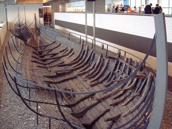 Skuldelev I: Ein wikingerzeitlichees Hochseehandelsschiff, das im Roskilde-Fjord in der Nähe von Skuldelev gefunden wurde.